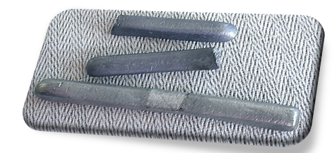 Cín